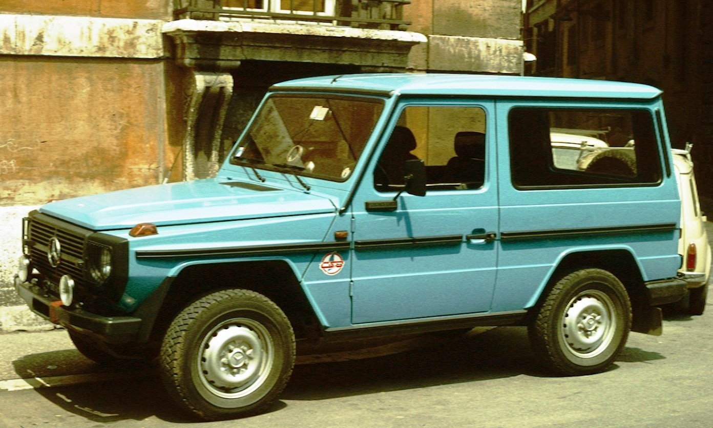 Mercedes Benz G Wagen swb